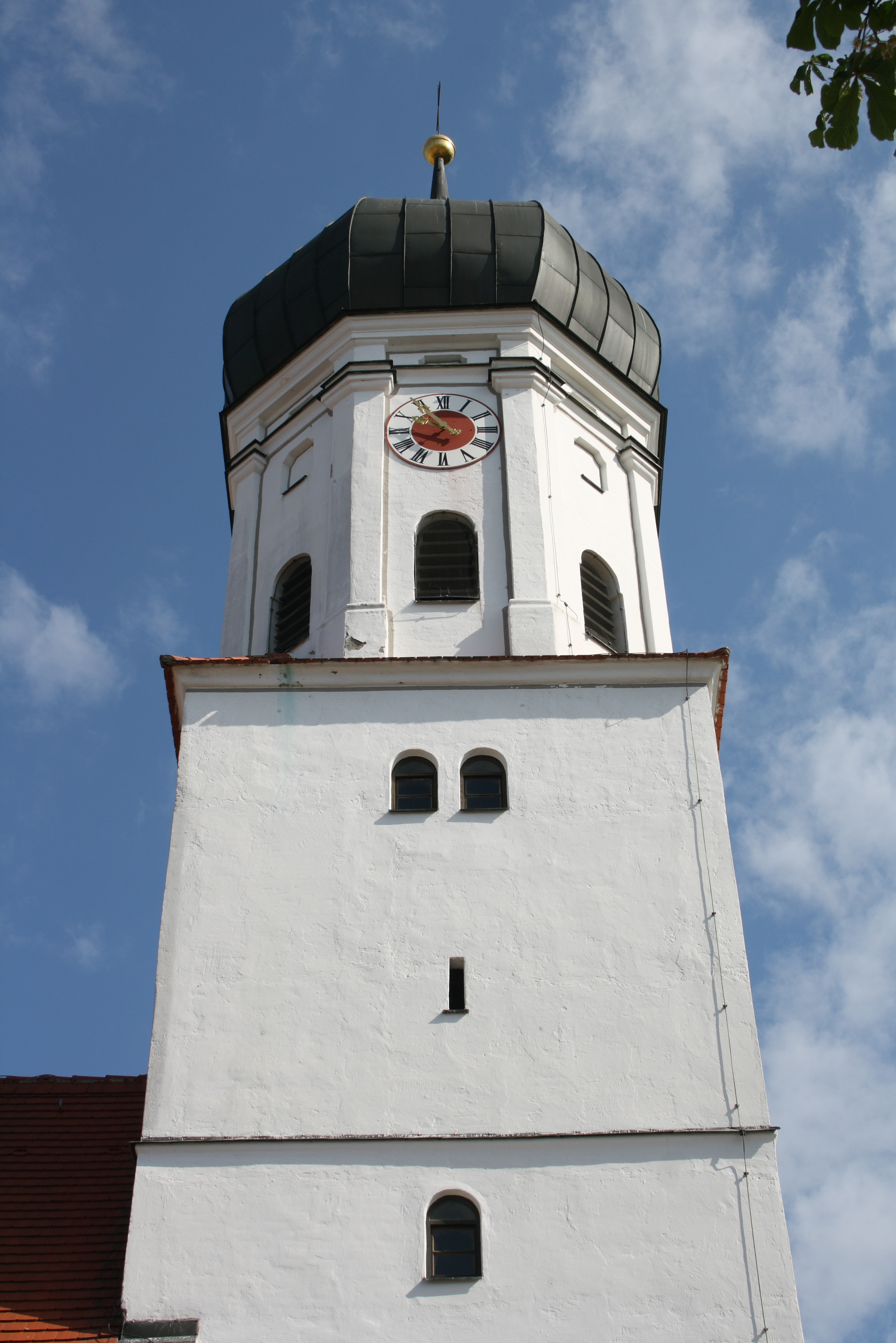 Katholische Pfarrkirche St. Nikolaus in Deisenhofen, einem Stadtteil von Höchstädt an der Donau im Landkreis Dillingen an der Donau (Bayern), Chorturmkirche (15./18. Jahrhundert), unterer Teil des Turmes aus dem 15. Jahrhundert, oktogonaler Aufbau mit Zwiebelhaube von 1710